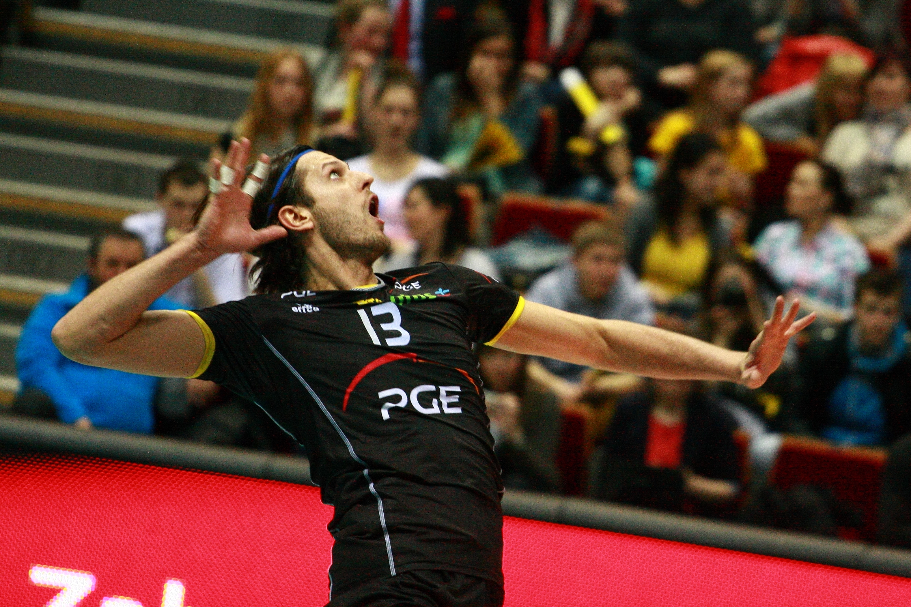 Lotos Trefl Gdańsk vs Skra Bełchatów